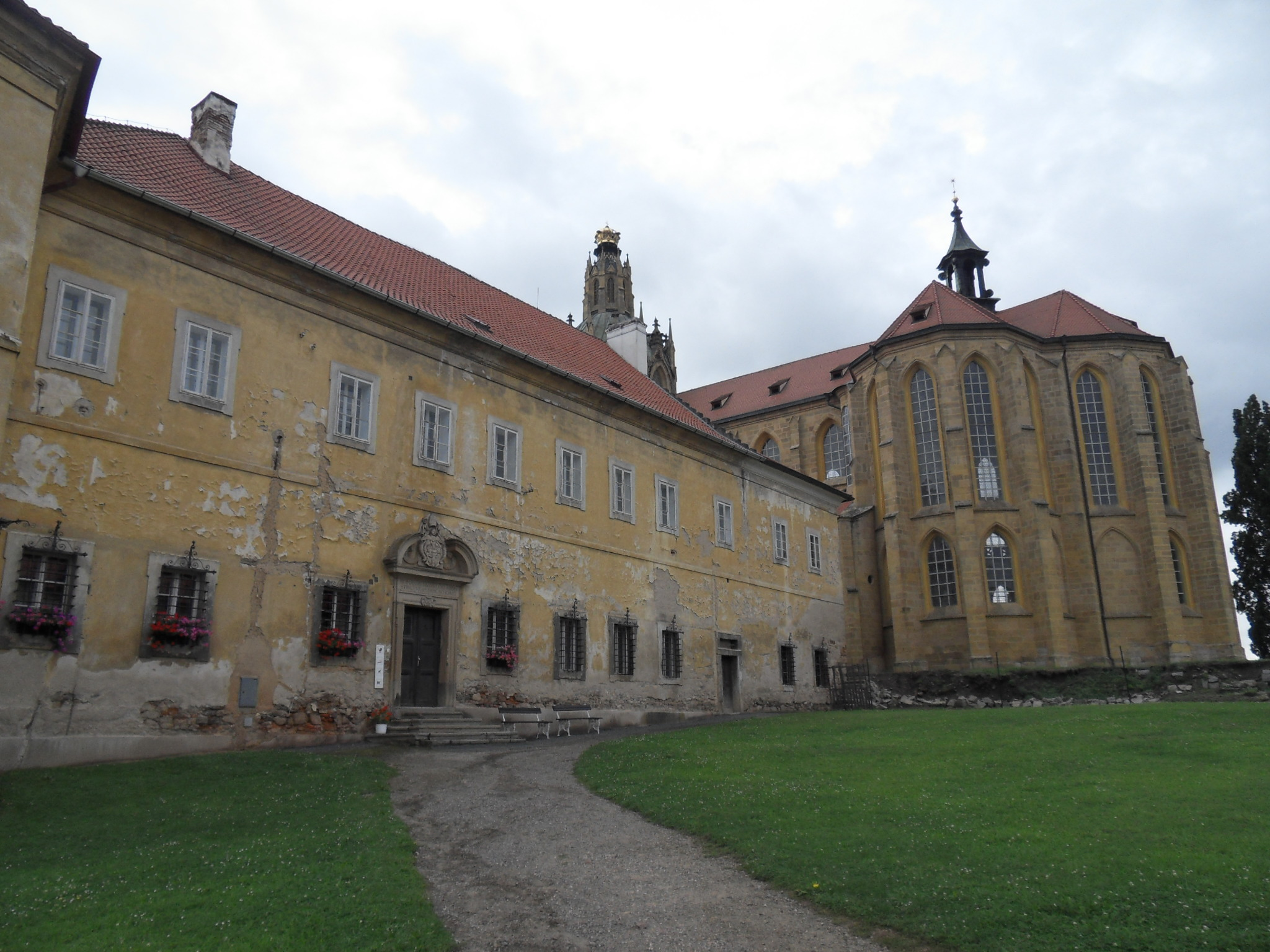 Stará prelatura. Klášter benediktýnů s kostelem Nanebevzetí Panny Marie, Kladruby 1, Kladruby (okres Tachov).